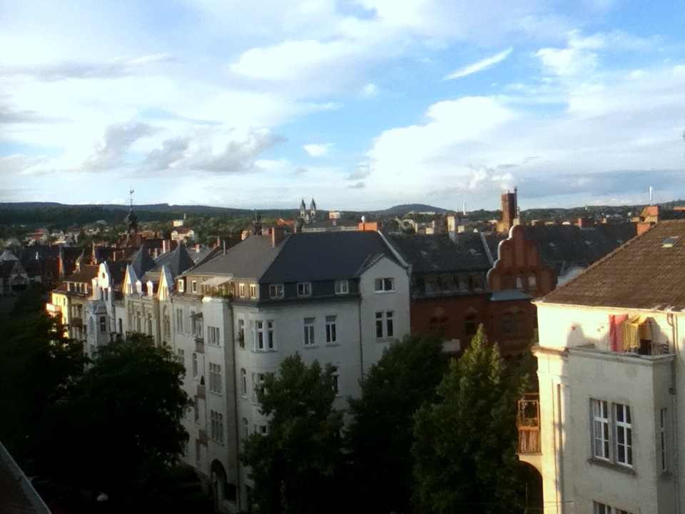 Blick über das Westend in Wiesbaden aus der Scharnhorststraße